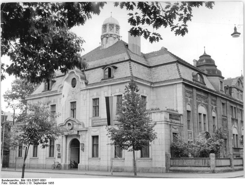 Cottbus, Haus der Freundschaft, Rundfunkstudio Cottbus Zentralbild Schutt 13.9.1955 Cottbus - Stadtbilder - Cottbus feiert 1956 seine 800-Jahrfeier Haus der Freundschaft Kultur- und Klubhaus der Gesellschaft für Deutsch-Sowjetische Freundschaft, zugleich Rundfunkstudio Cottbus.